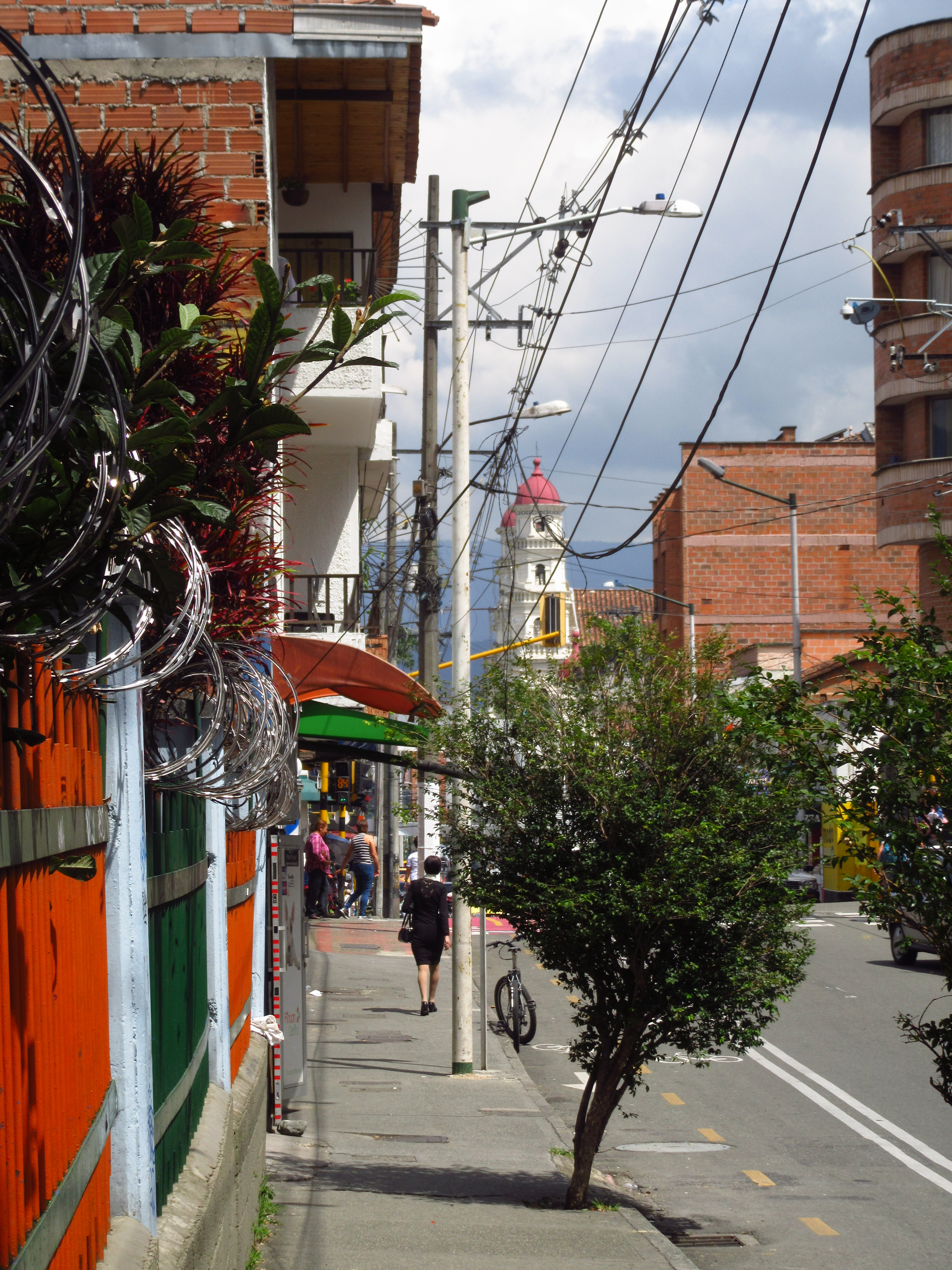 2019 Envigado - Carrera 42 cerca de la calle 40 sur